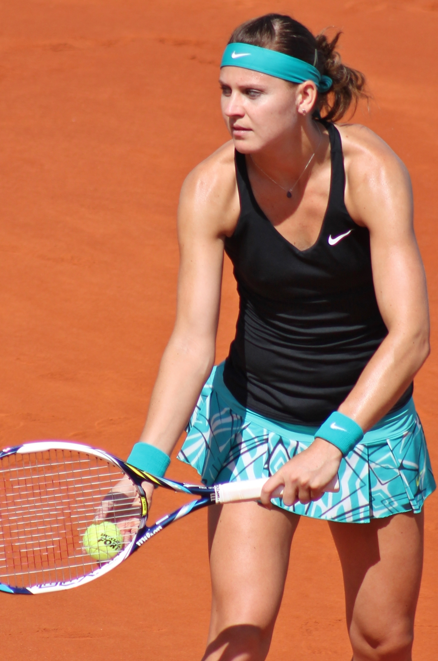 Safarova MA14 - Copy